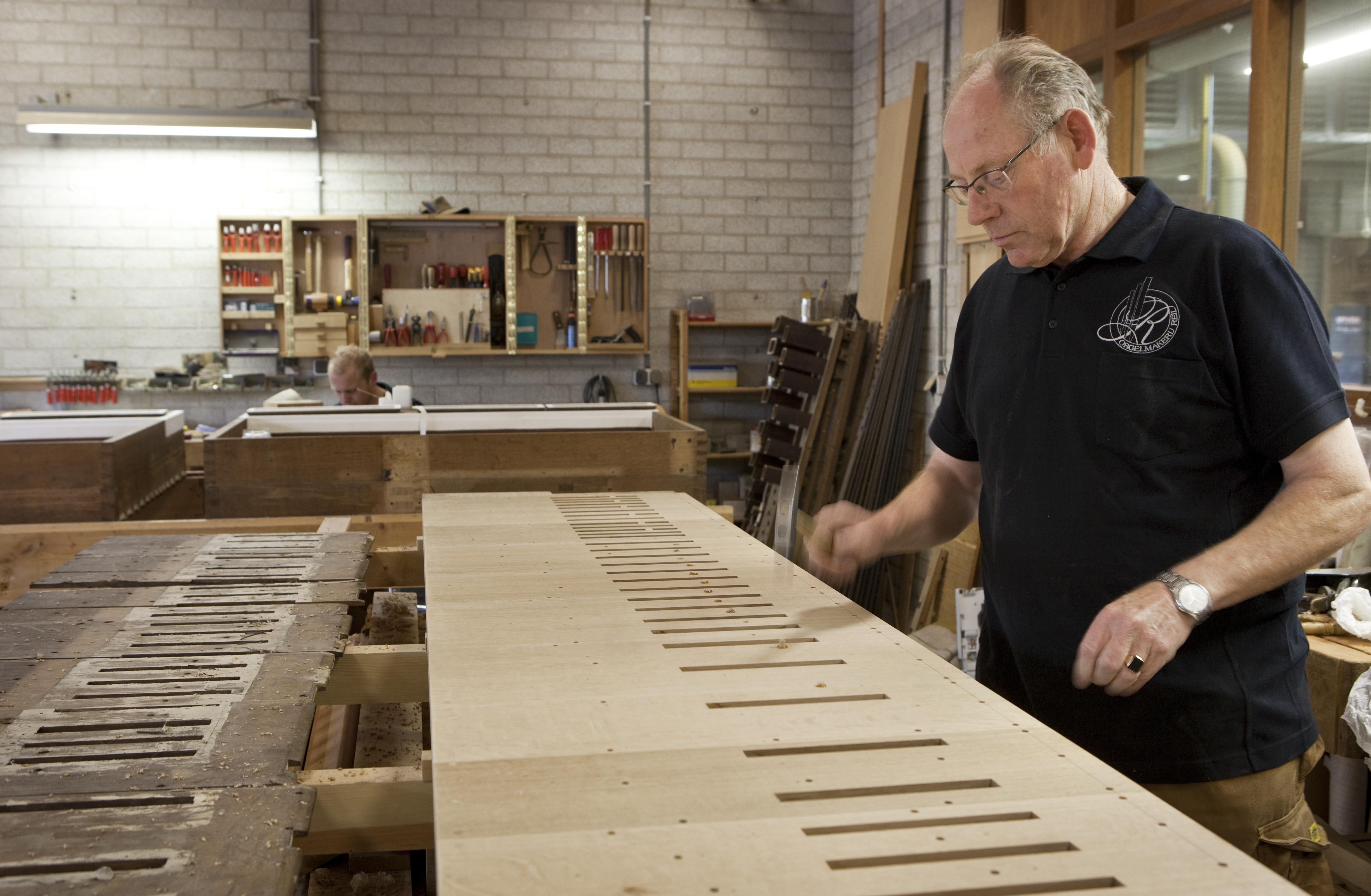 Nicolaï Orgel: Interieur orgelmakerij Reil te Heerde, orgelbouwer tijdens werkzaamheden